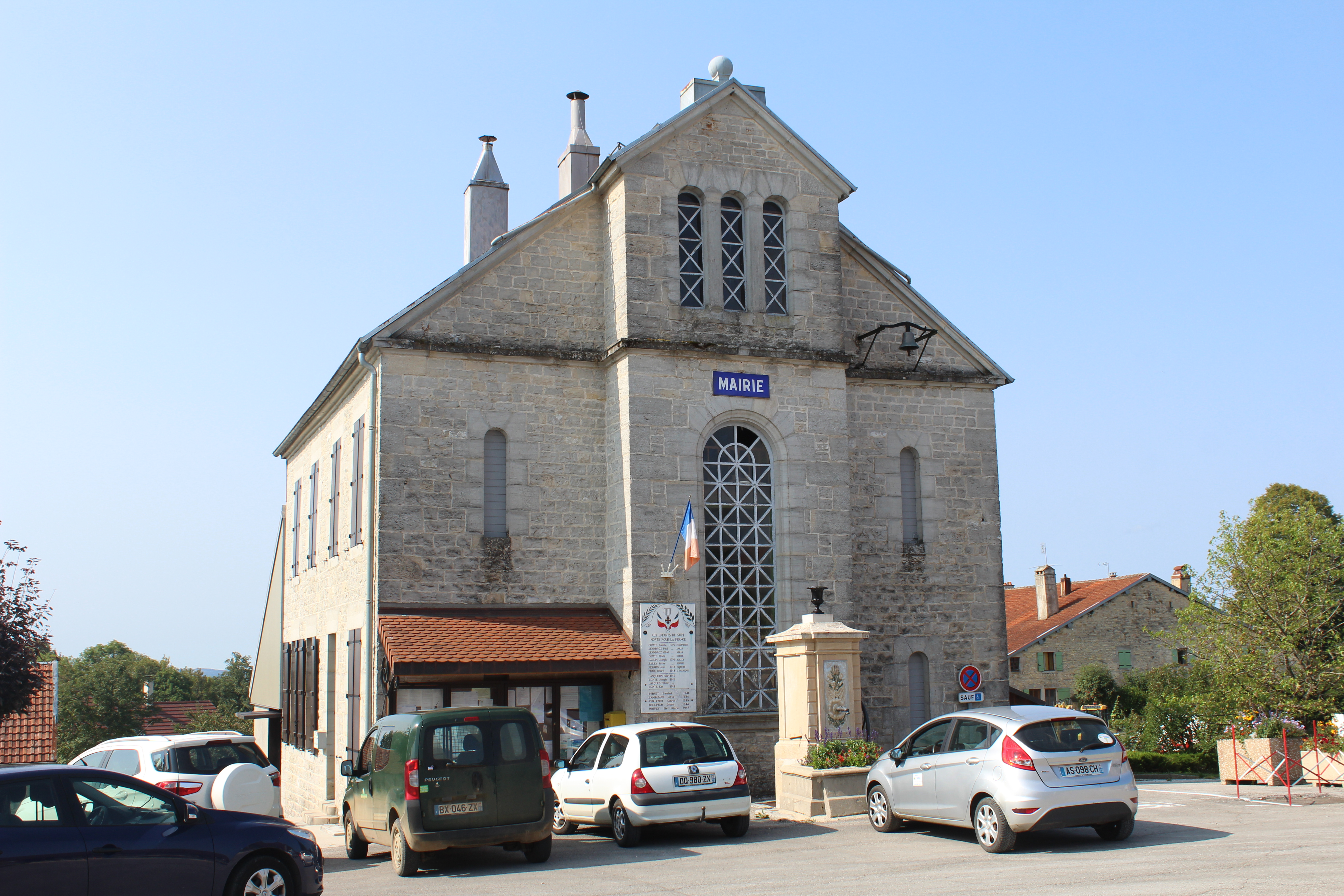 Mairie de Supt.